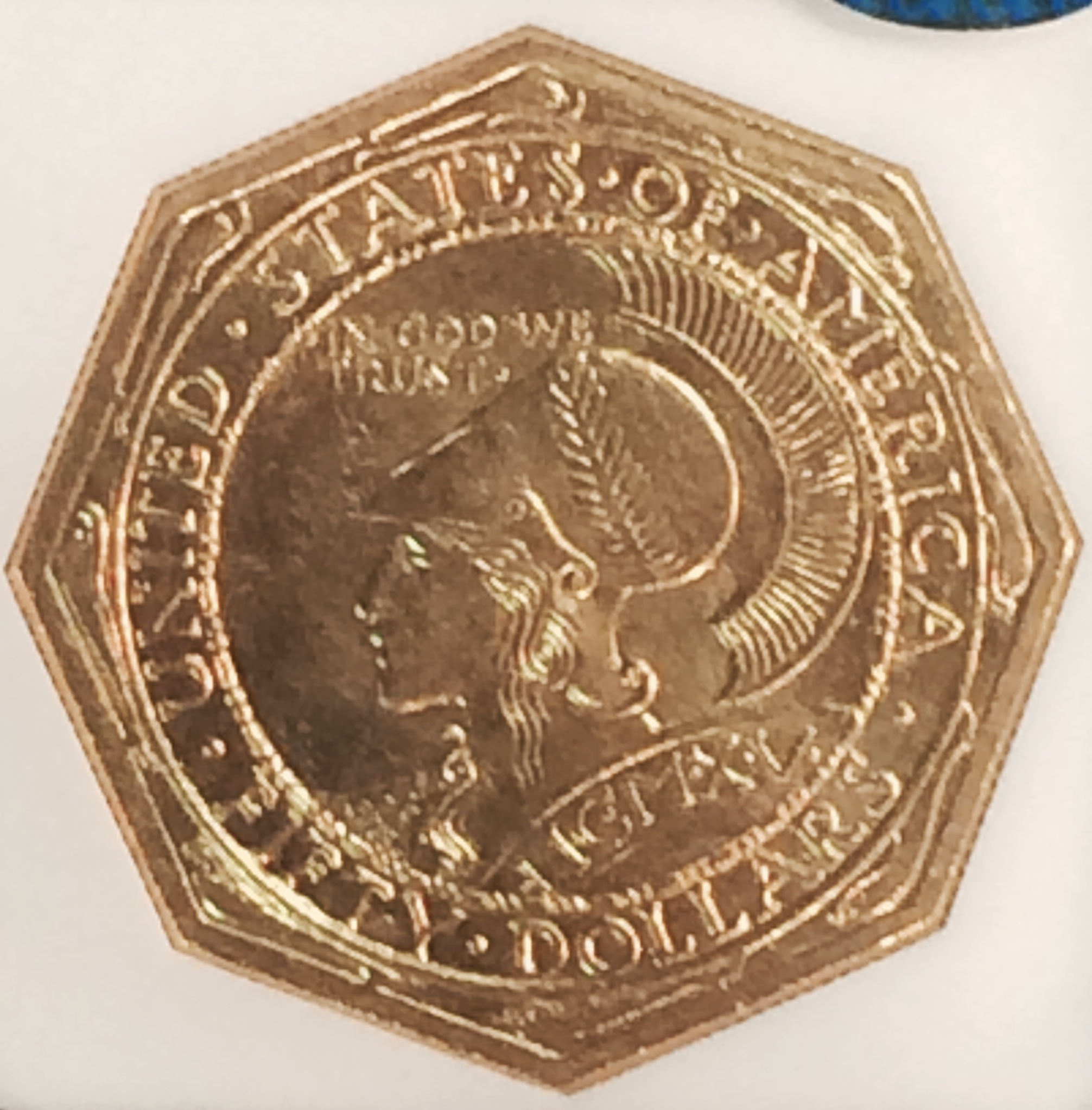 1915-S Panama Pacific octogonal $50 piece